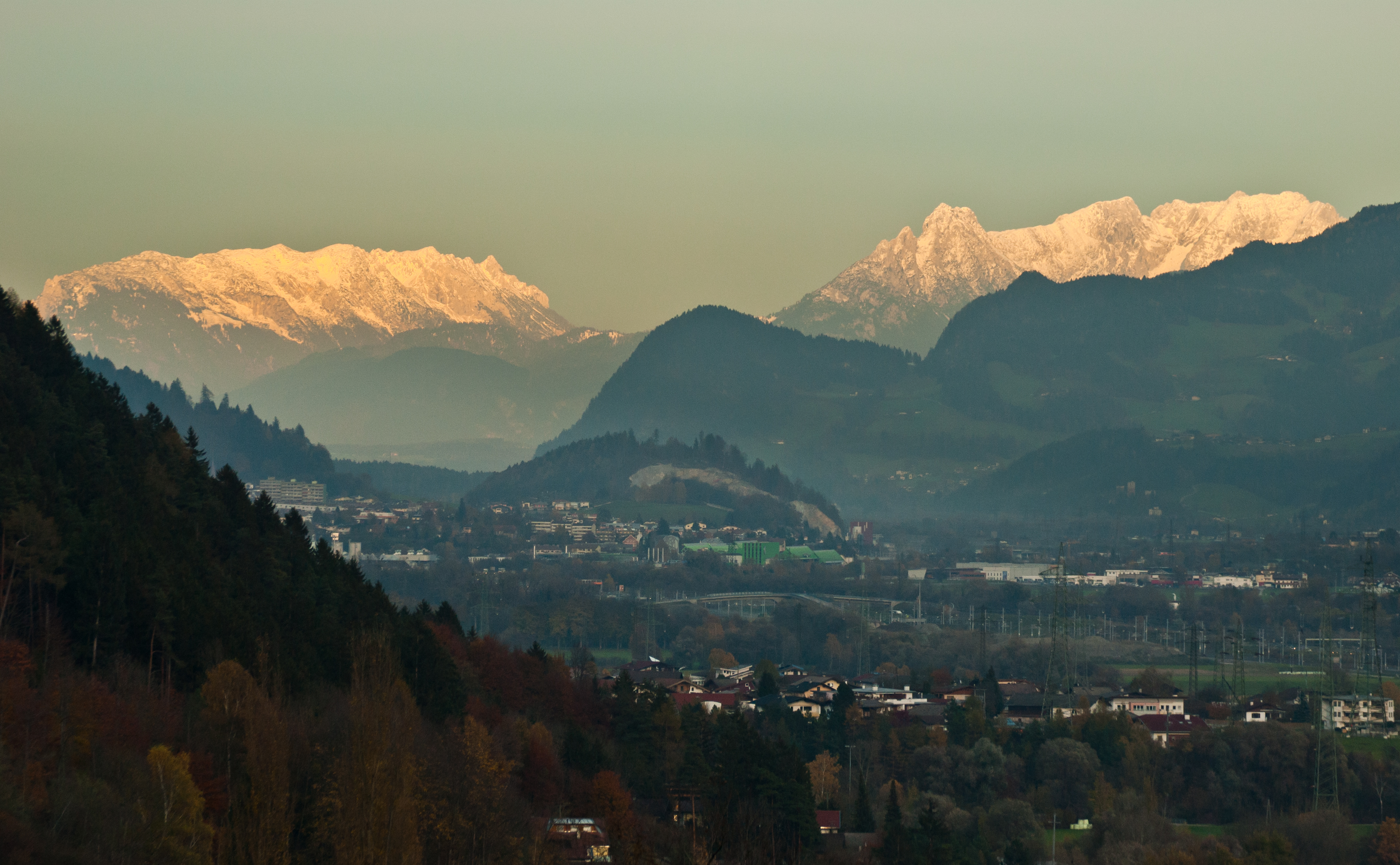 Zahmer- und Wilder Kaiser with Inn-Valley seen from Vomp